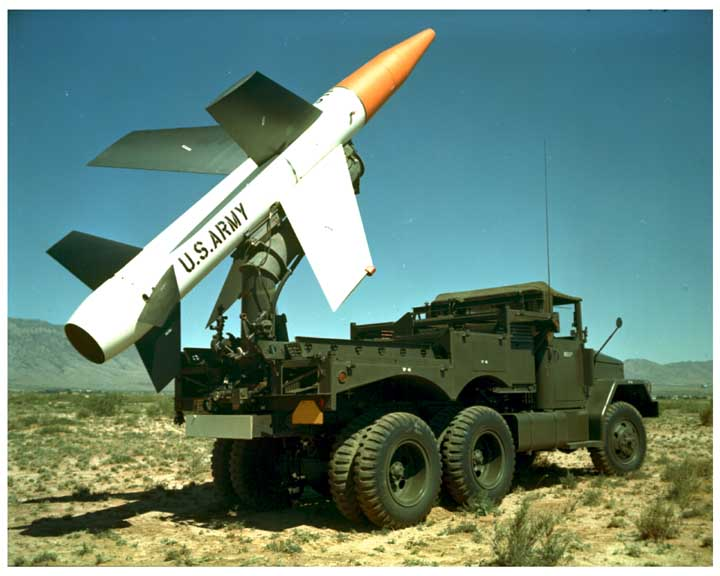 MGM-18 Lacrosse